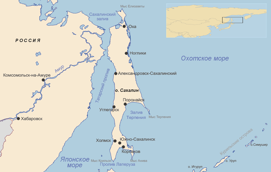 Сахалин